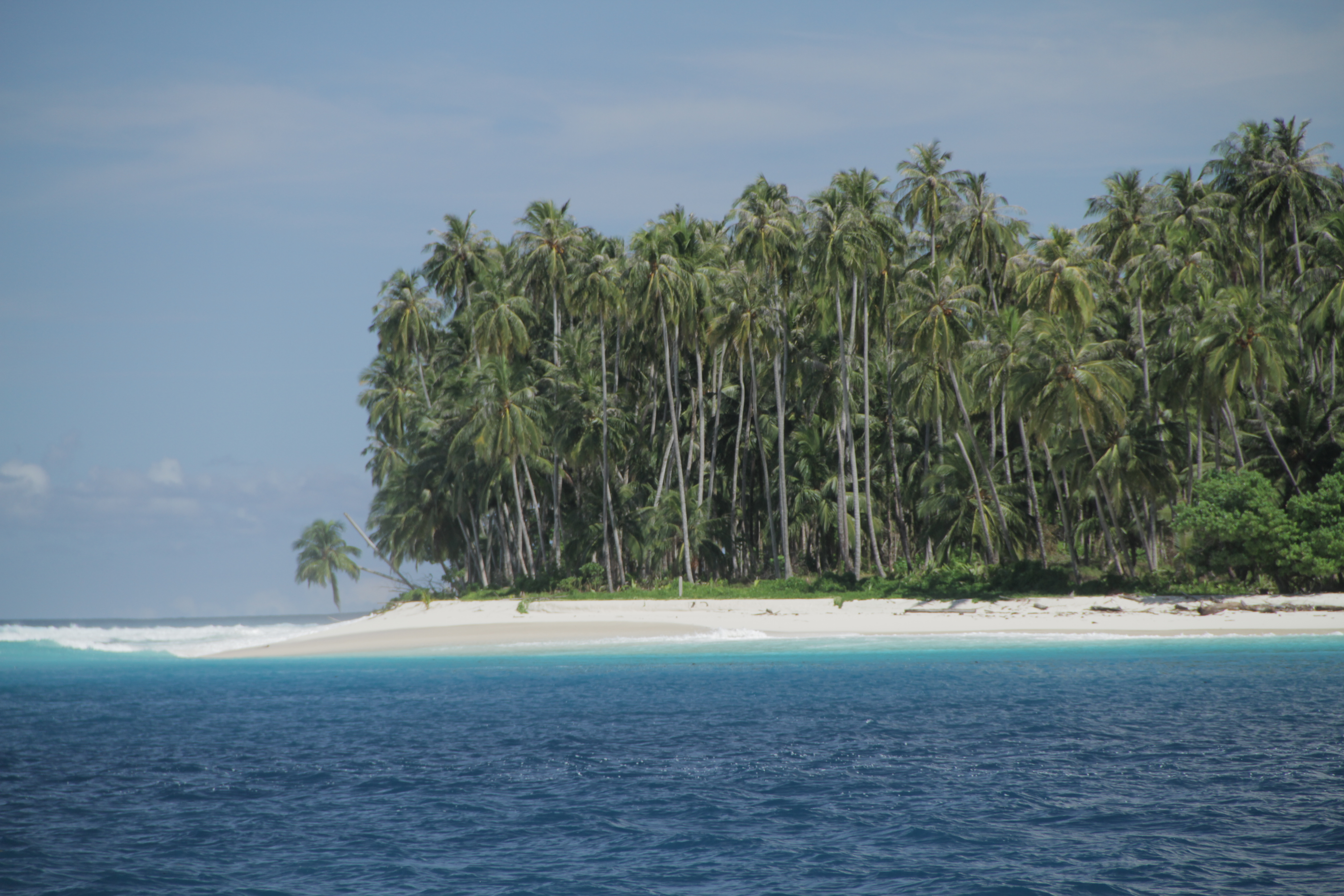 Unnamed Road, 07000 Langkawi, Kedah, Malaysia